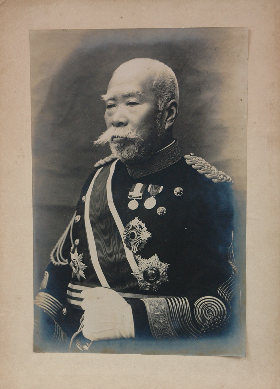 晩年の谷干城。